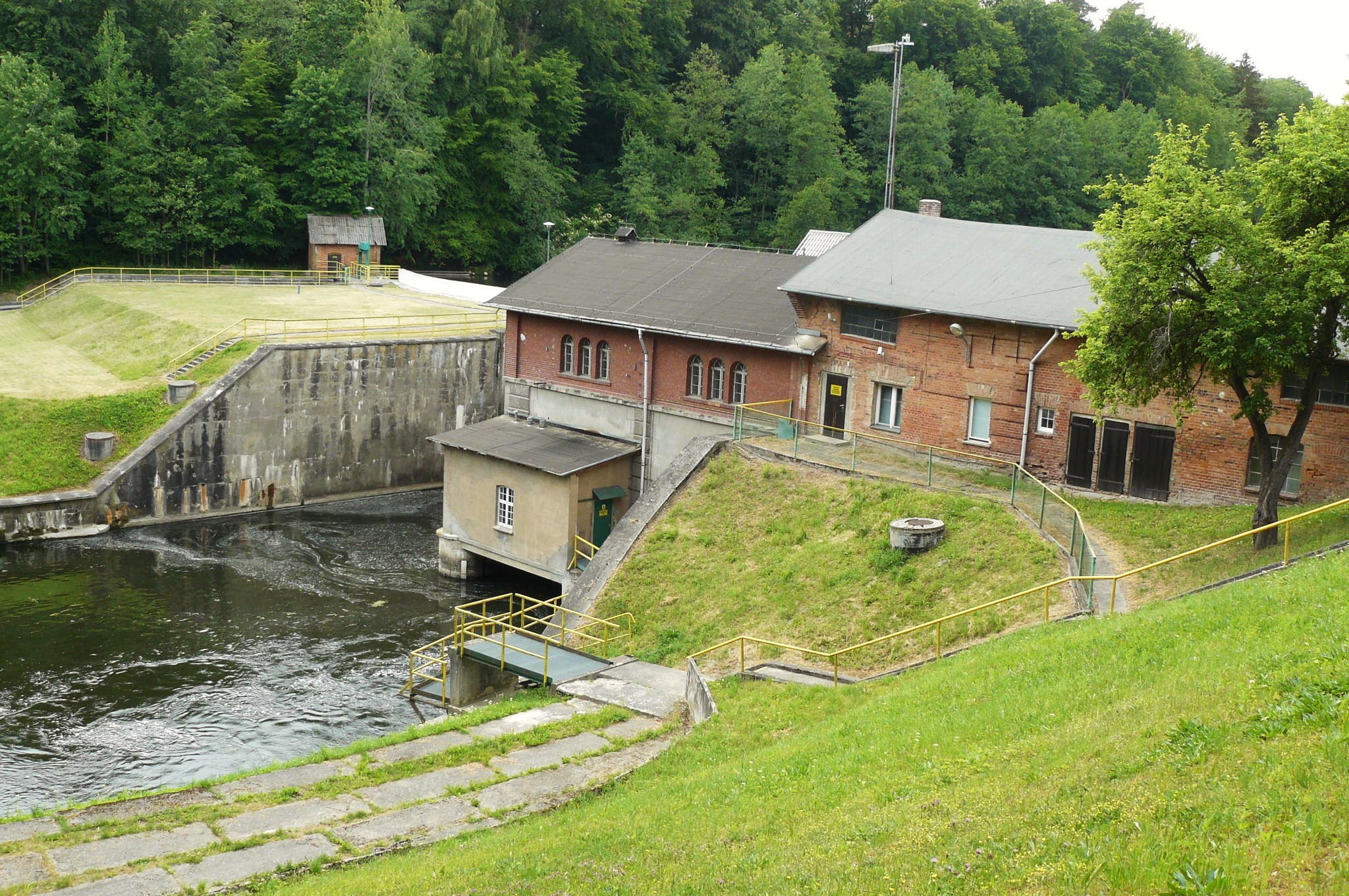 Elektrownia wodna Kamienna w Głusku.